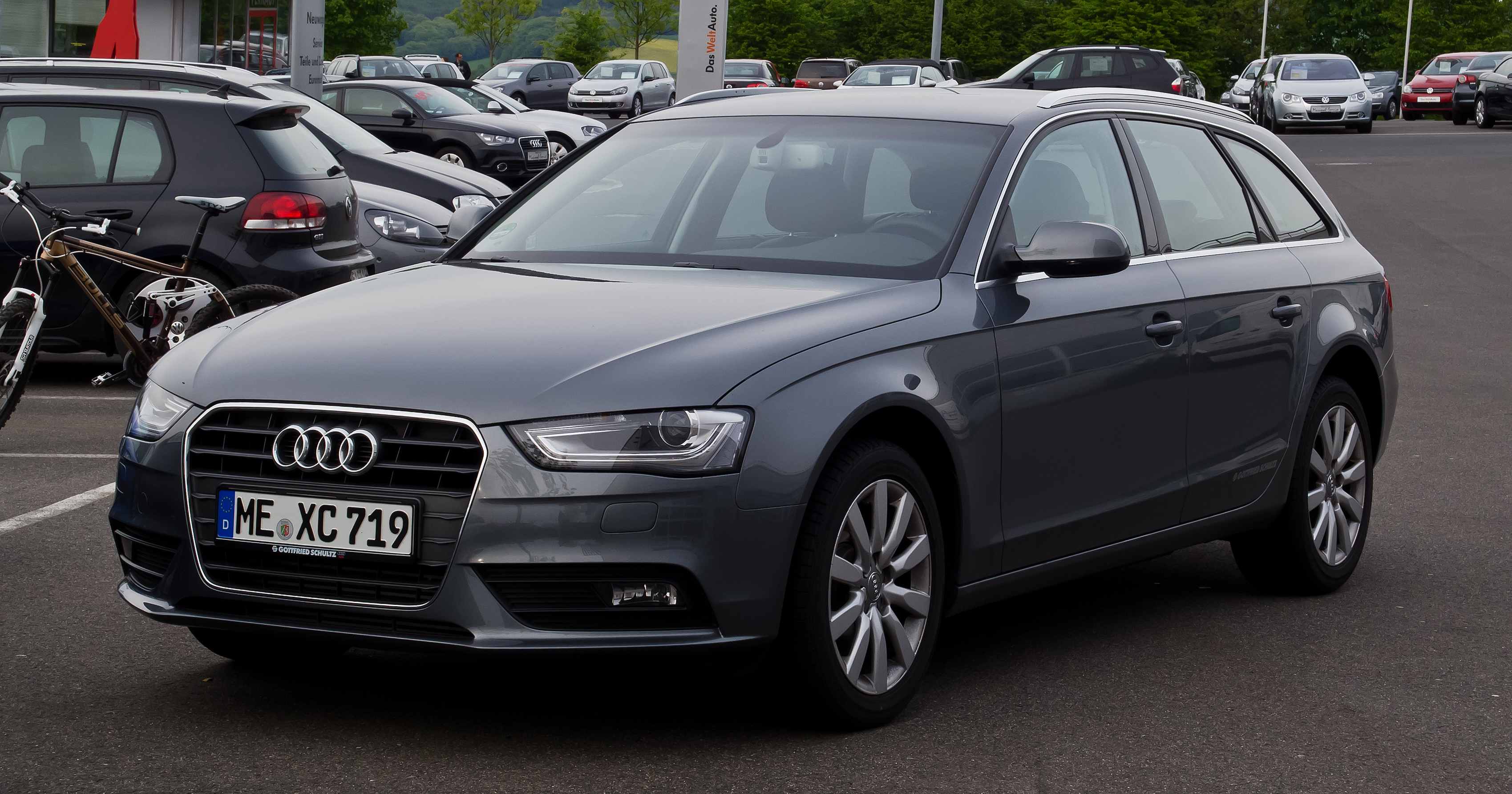 Audi A4 Avant 2.0 TDI Ambiente (B8, Facelift)